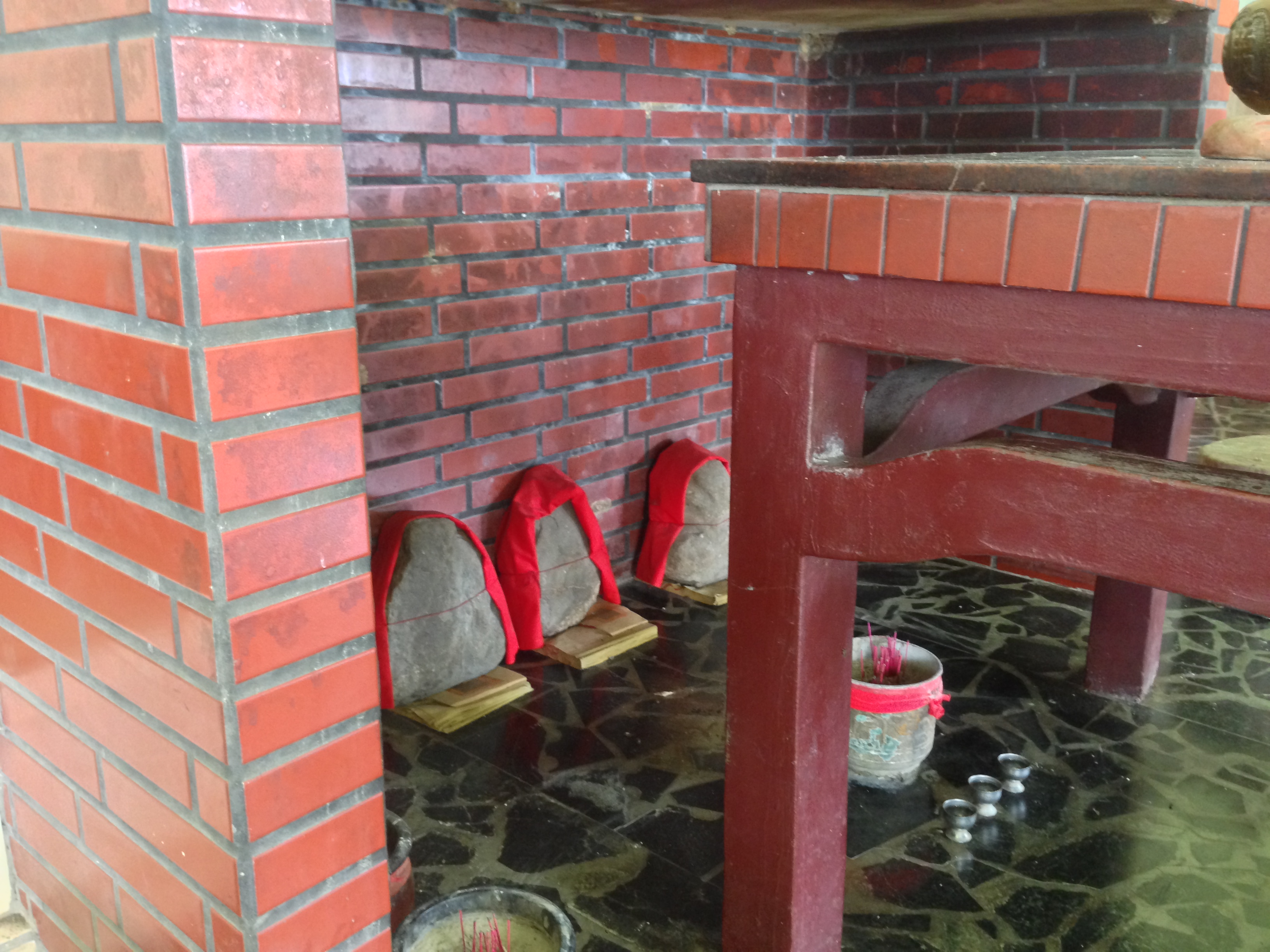 中埔公廨廟桌下祖靈石